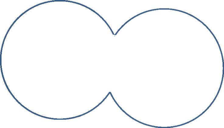 Actualment els dos estels es troben tan a prop que comparteixen atmosfera.